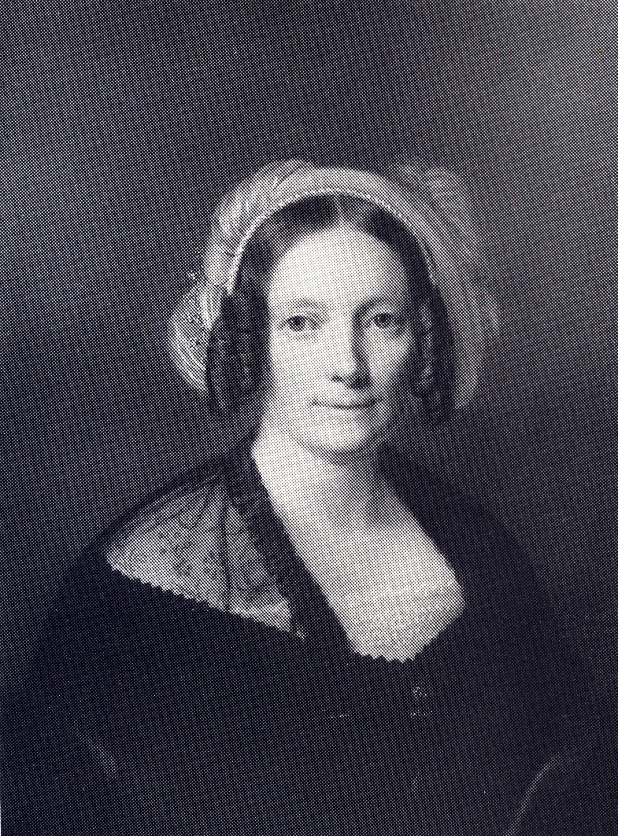 Portret (pastel) van de kunstschilderes Martina Adriana Maria van Toulon (1792–1880) Alternative namesMar[t]ina Adriana [Maria] Beeldsnijder van Voshol-van ToulonDescription Dutch painter Date of birth/death20 August 179213 October 1880Location of birth/deathThe HagueUtrechtWork periodbetween circa 1807 and circa 1880Work locationGouda (-1818) Rupelmonde, buitenplaats nabij Nieuwersluis (1818-1828) Utrecht (1828-)Authority control VIAF: 285267244 ISNI: 0000 0003 9139 3454 BPN: 05958047 RKD: 77999